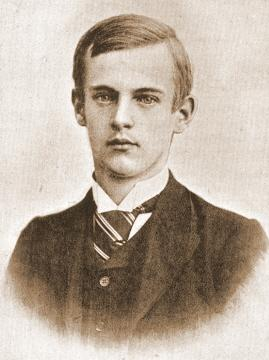 Carl August Walbrodt (1871-1902)